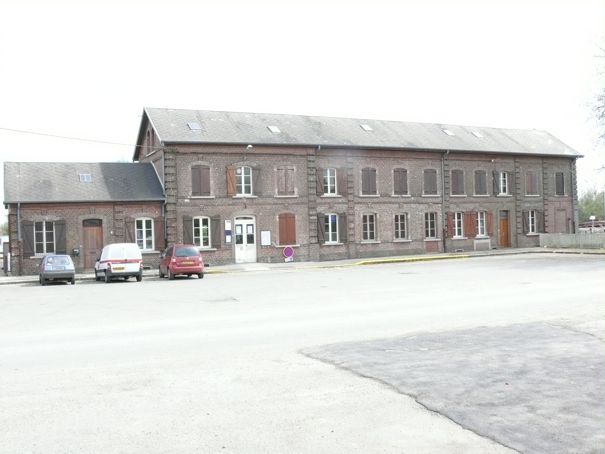 Gare d'Abancourt, avant sa rénovation de 2008